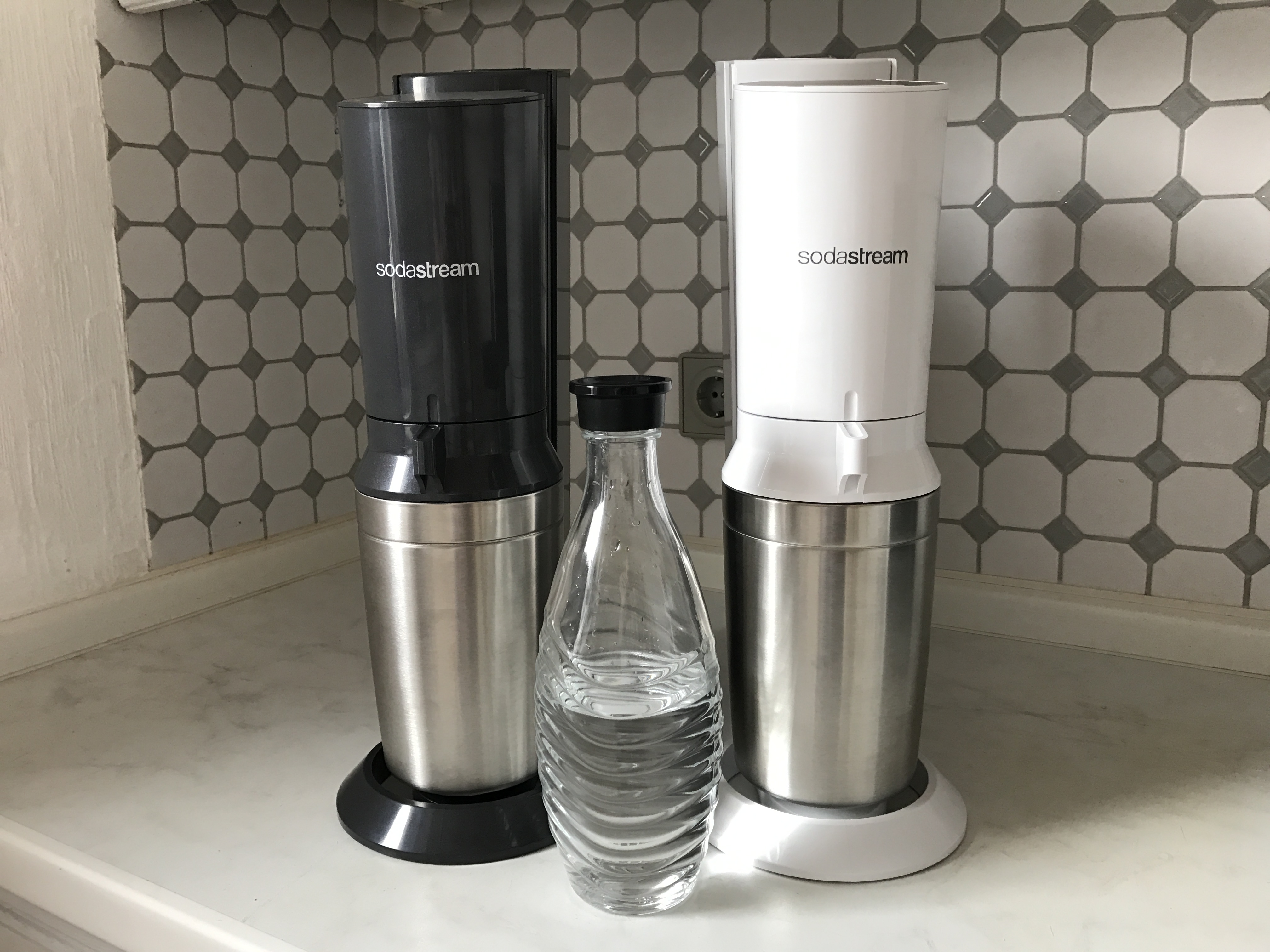 SodaStream Crystal 2.0 Wassersprudler (Titan & Weiß)